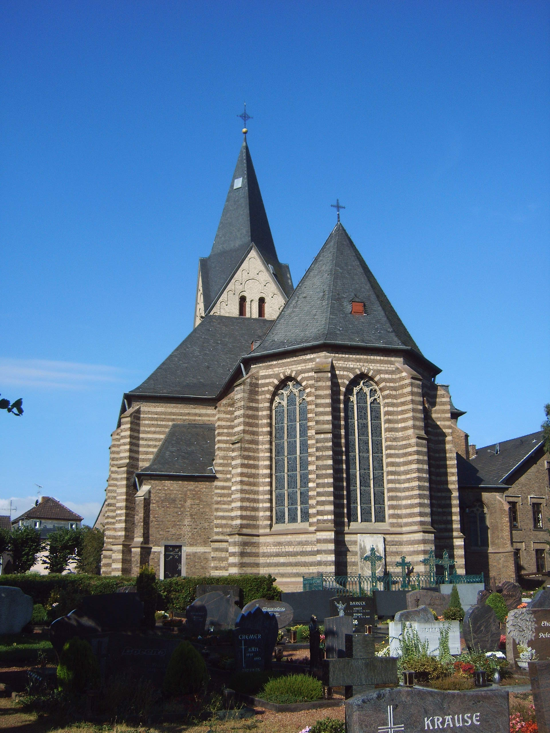 Sankt-Pankratius-Kirche in Paffendorf, Bergheim, Germany